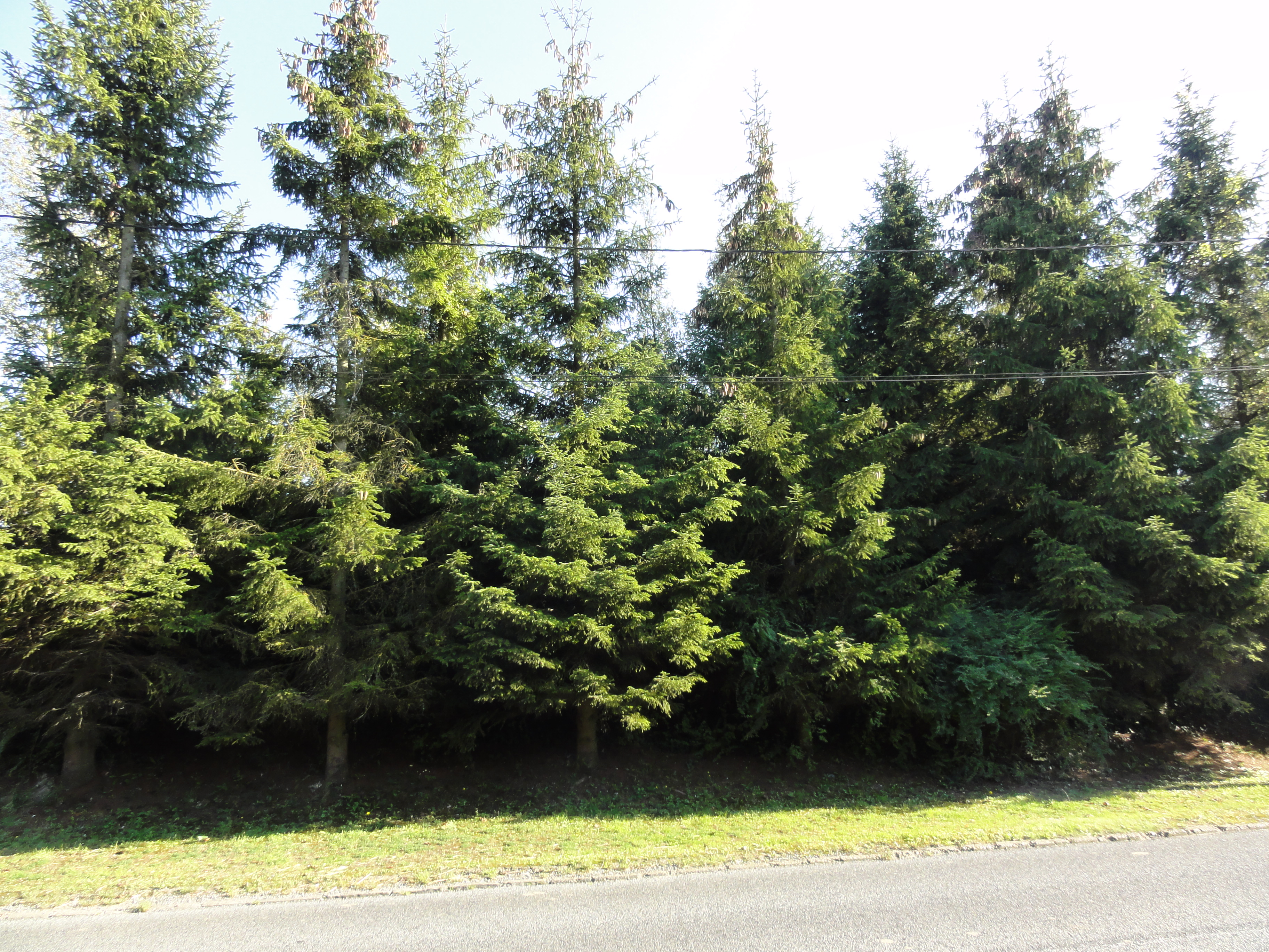 Terril n° 229 dit Décharge Falande, Compagnie des mines de Bruay dans le bassin minier du Nord-Pas-de-Calais, Haillicourt, Pas-de-Calais, Nord-Pas-de-Calais, France.